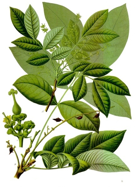 Schleichera oleosa. A Blühender Zweig. B Zweig mit unreifen Früchten. 1 ein Blütenknäuel, vergrössert.